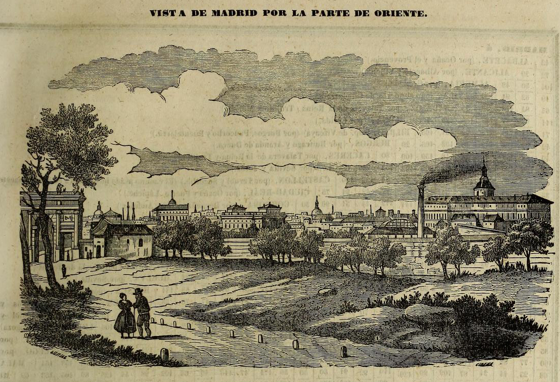 Vista de Madrid por la parte de Oriente, mediados del siglo XIX, Madrid, España.